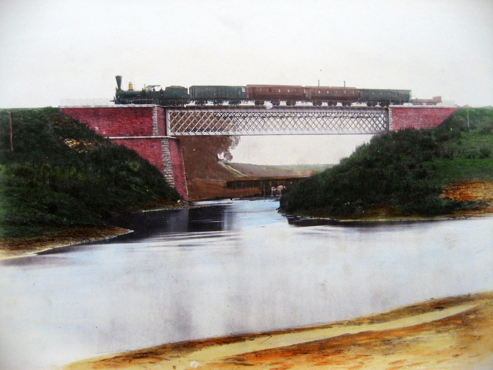 Мост через реку Оптуху.